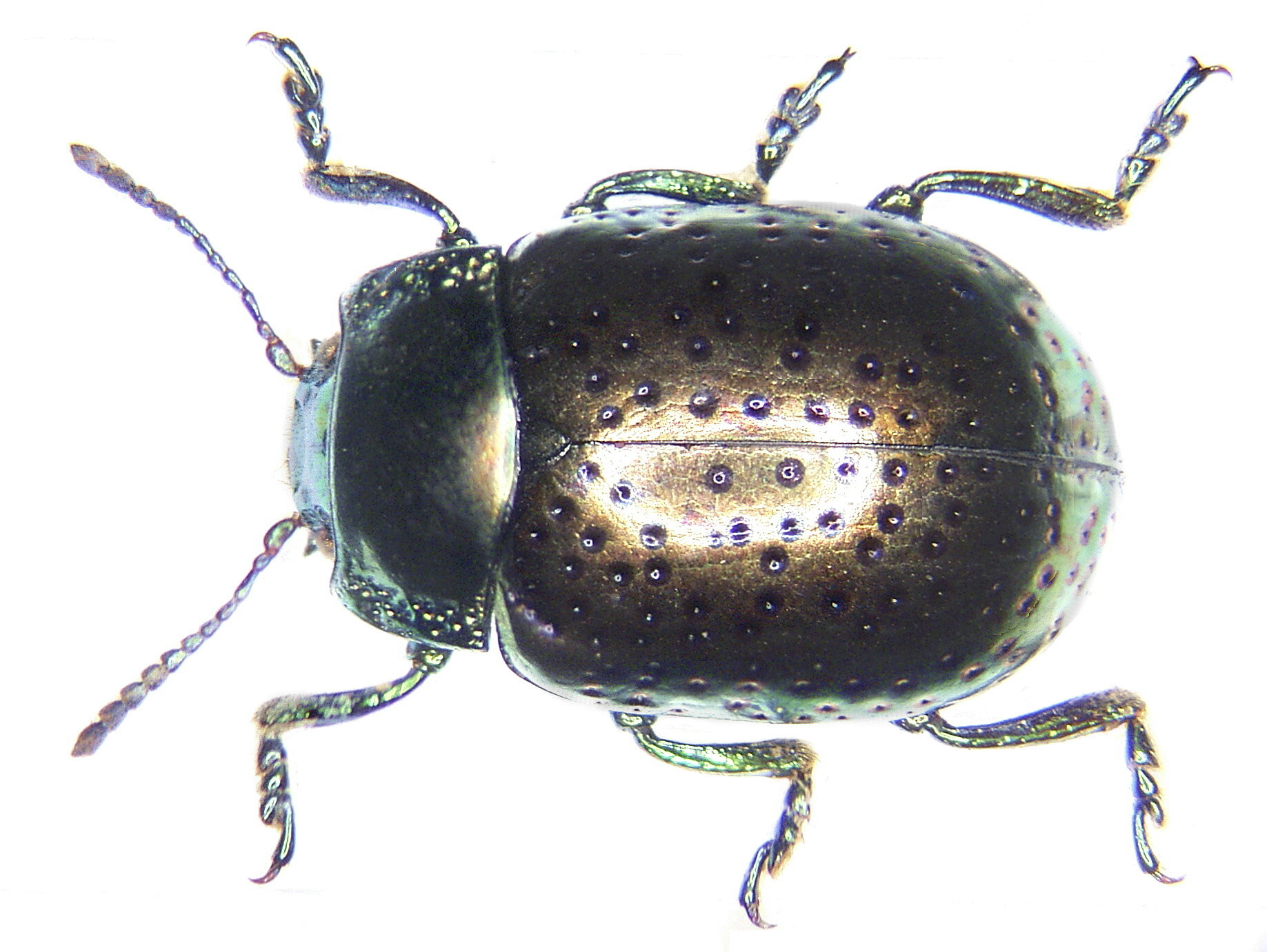 Familie: Chrysomelidae Grösse: 10 mm Verbreitung: Mittelmeergebiet Fundort: Tunisia, Hammamet leg. U.Schmidt, 1993; det. Kippenberg Foto: U.Schmidt, 2006